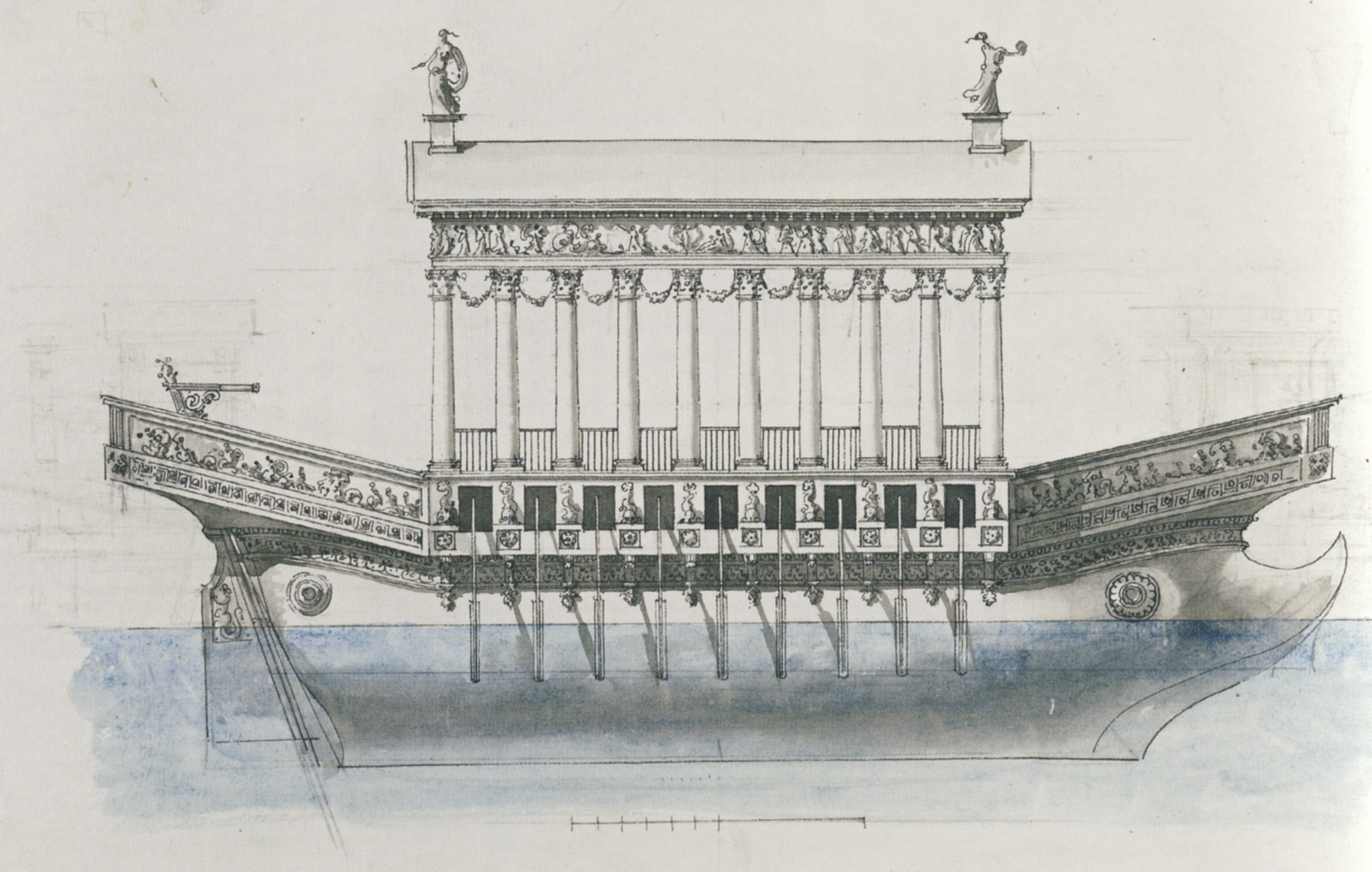 Gustav III:s lustfartyg "Lyckans tempel" skulle finnas på Brunnsviken, blev dock aldrig tillverkat